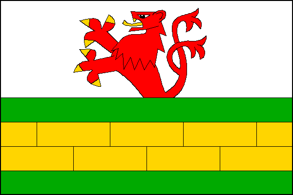 vlajka, ,Pravice okres Znojmo